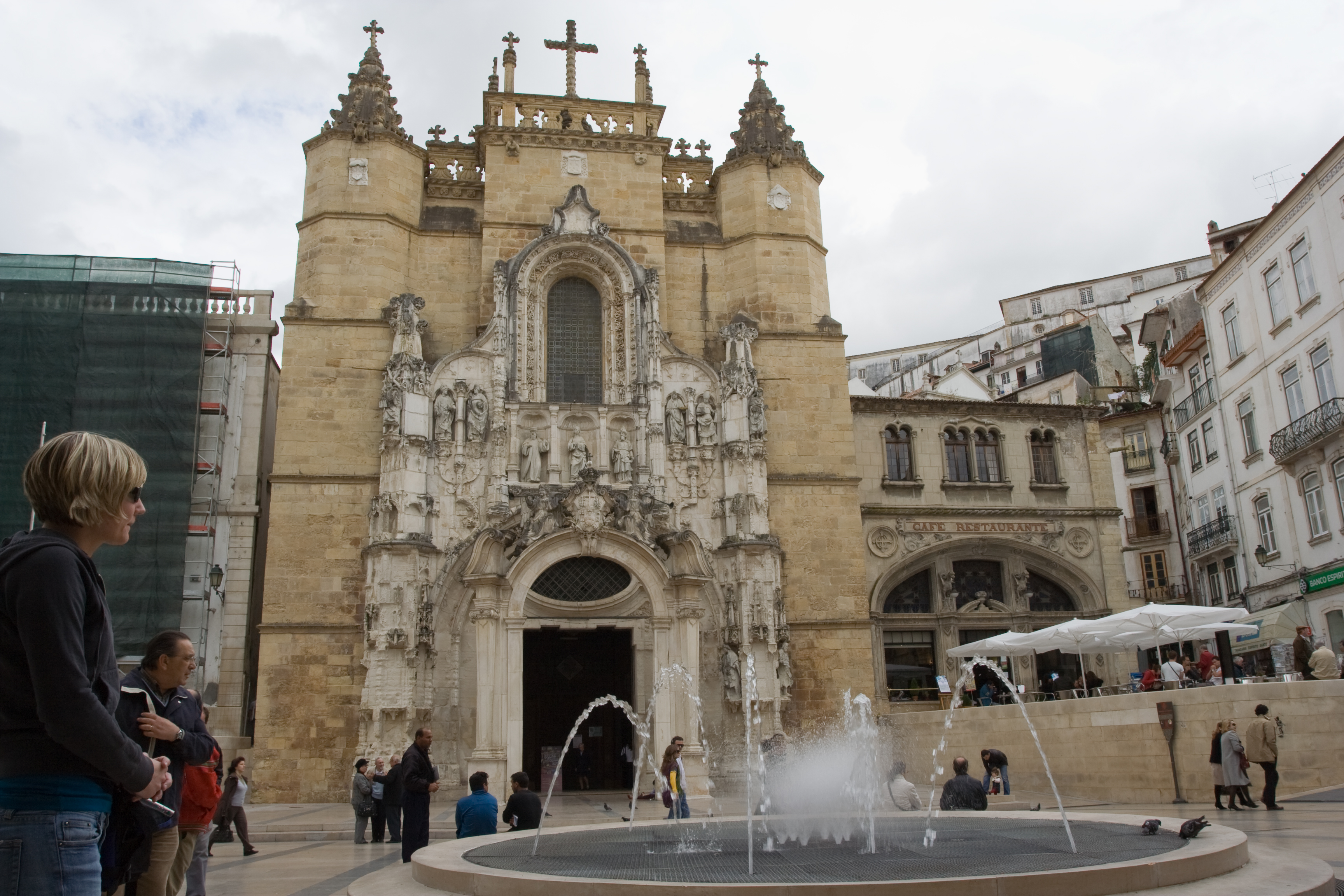 Igreja de Santa Cruz